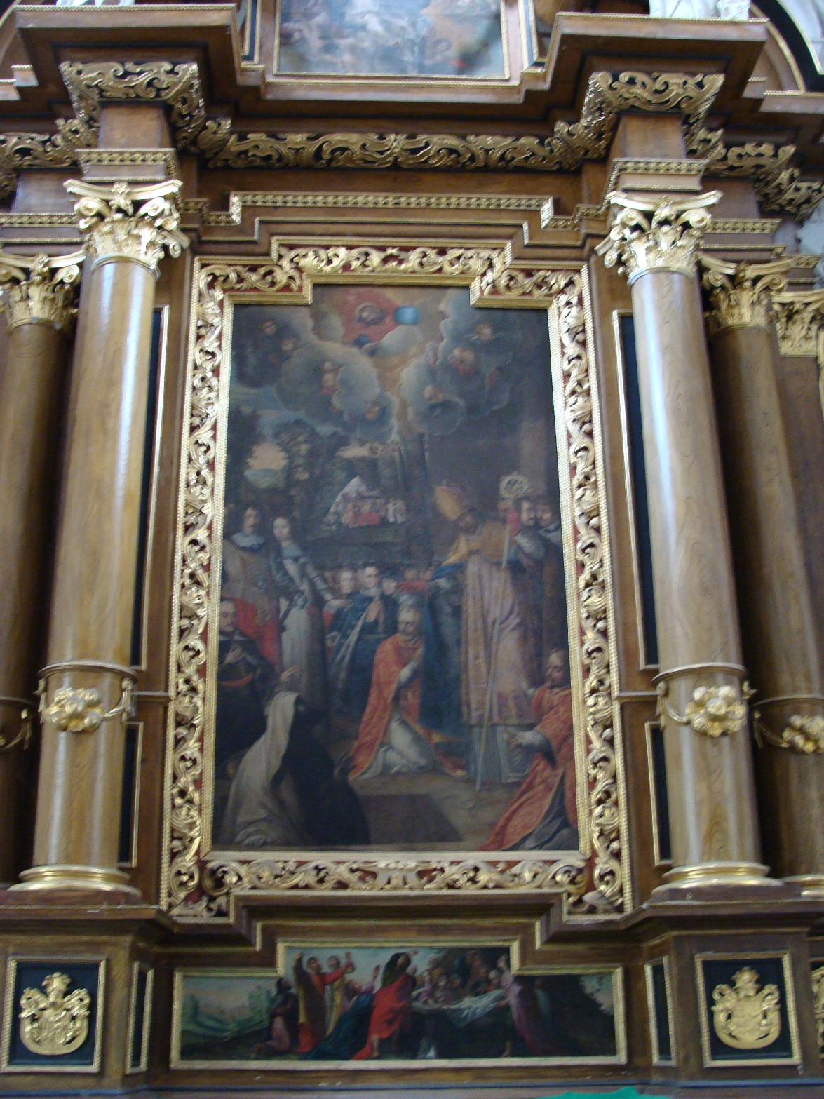 Kaplica nagrobna Oświęcimów. Fundowana w 1647 przez Stanisława Oświęcima. Projekt architekta W. Petroniego i J.Ch. Falconiego. Pod kaplicą krypta Stanisława i Anny rodzeństwa Oświęcimów.